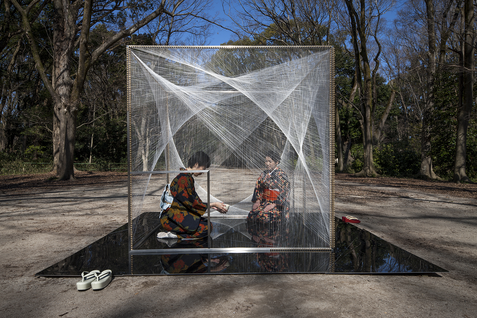 Basa Jawa: 織物の茶室～下鴨神社・糺の森～